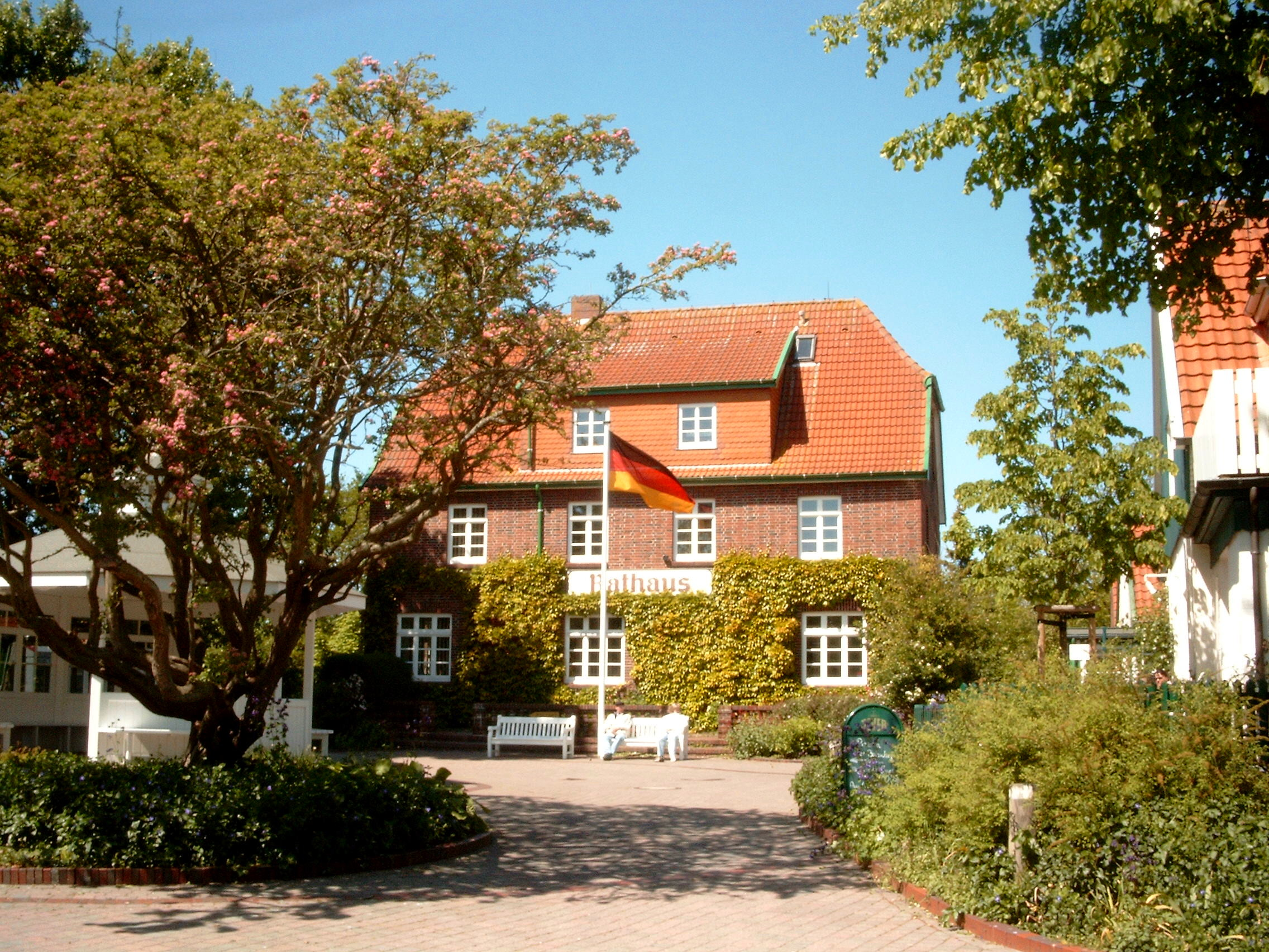 Rathaus Spiekeroog 2004